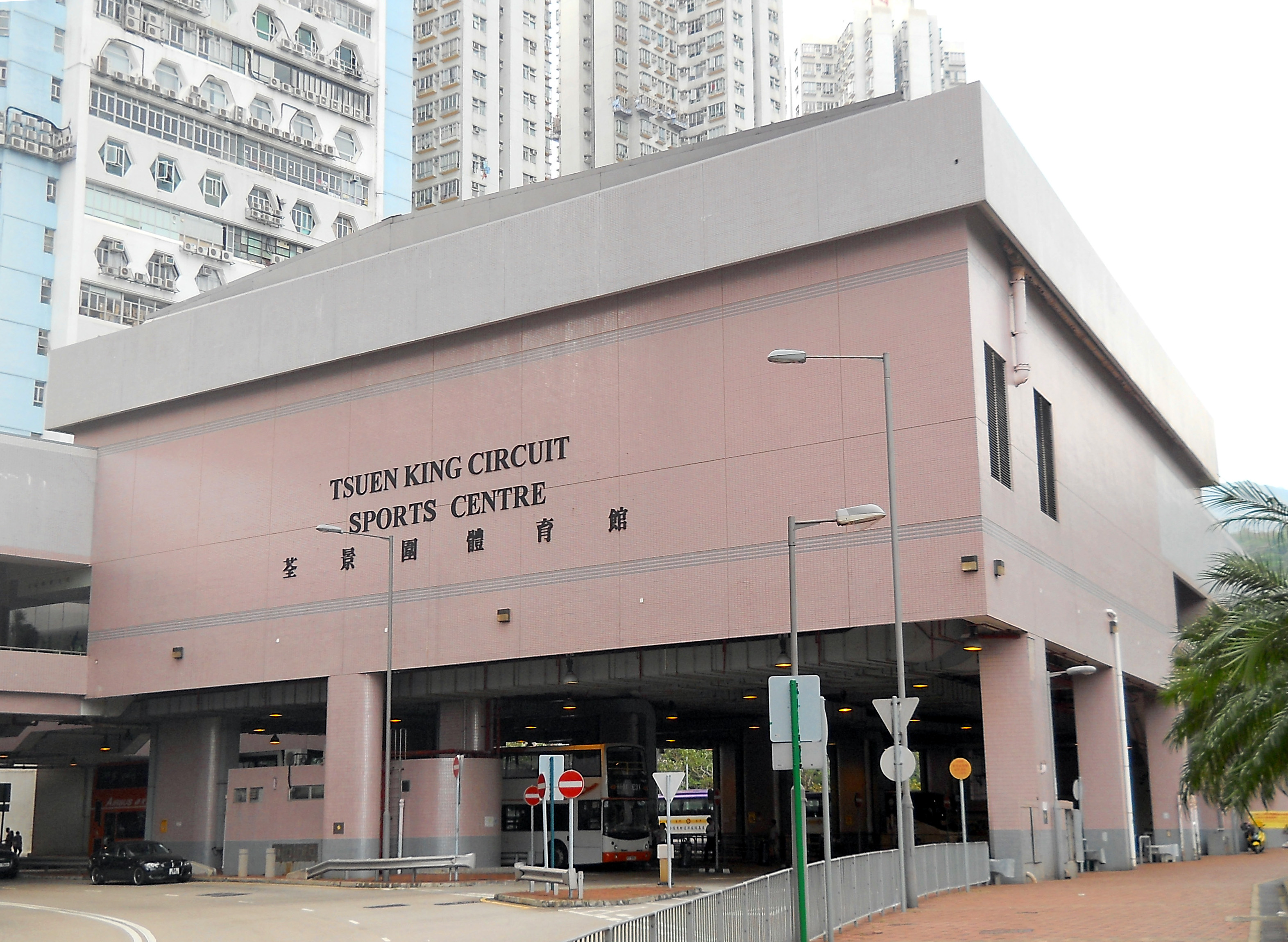 中文（香港）: 荃景圍體育館